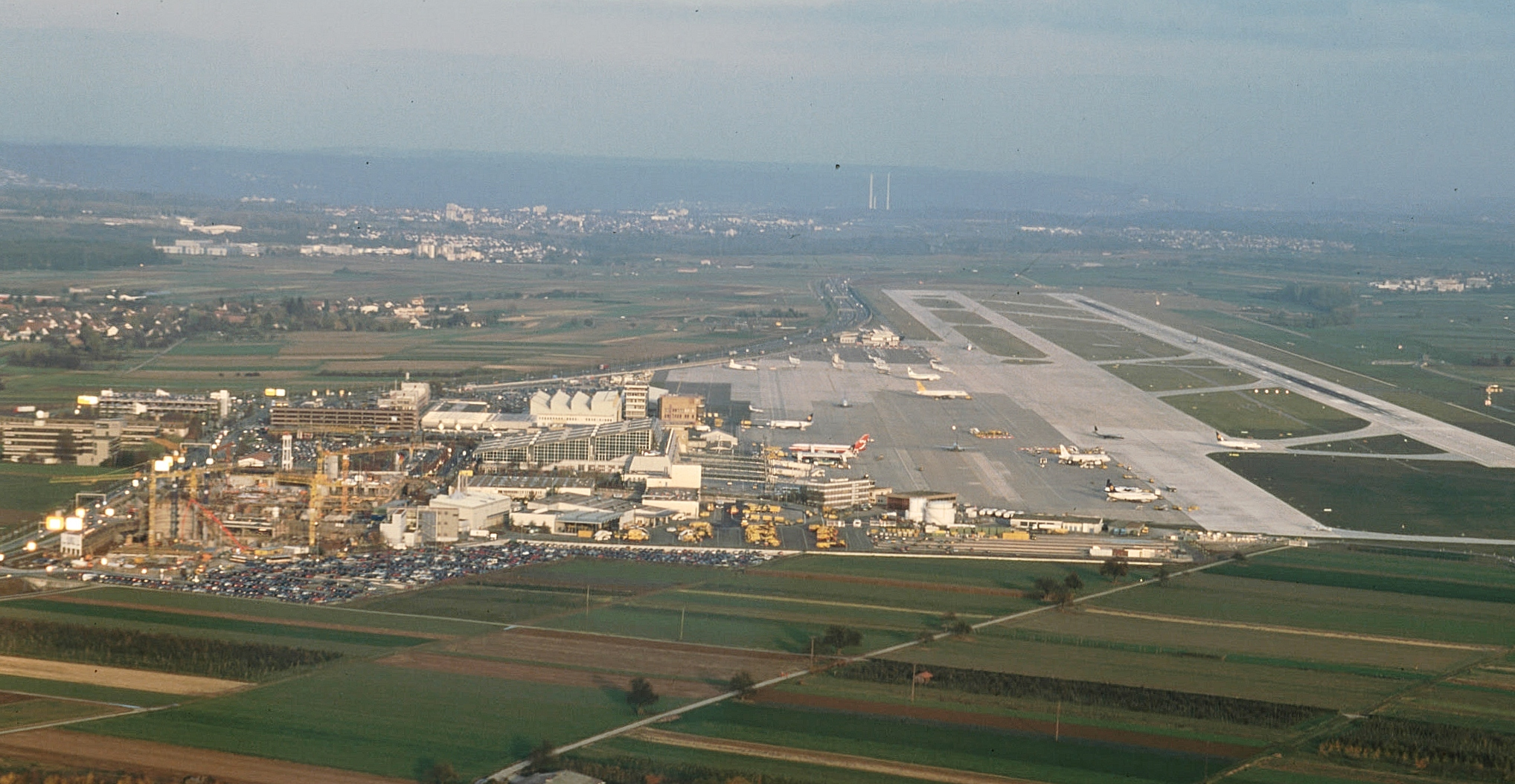 Manfred Rommel Airport, Flughafen Stuttgart